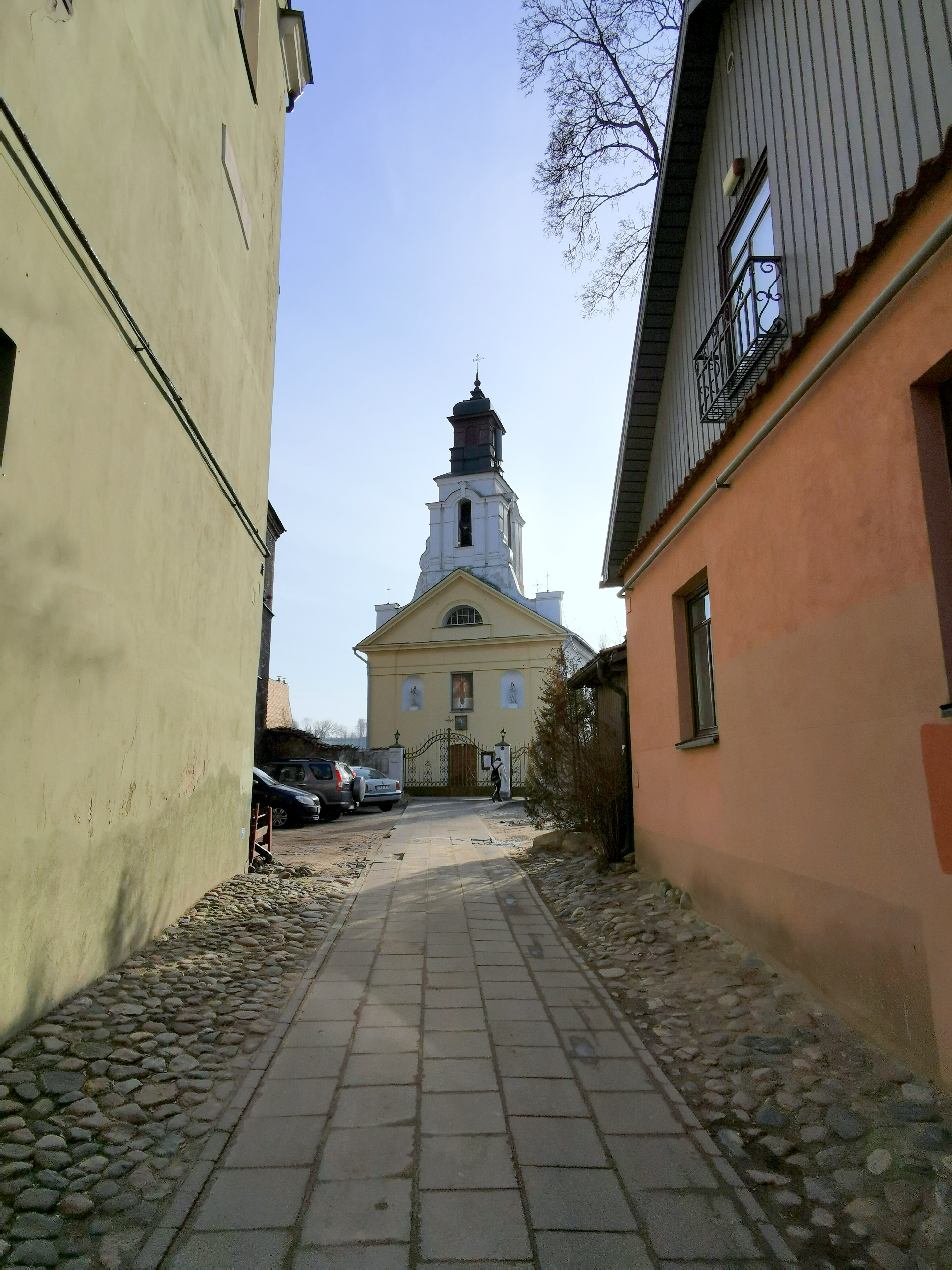 šv. Baltramiejaus bažnyčia Užupyje